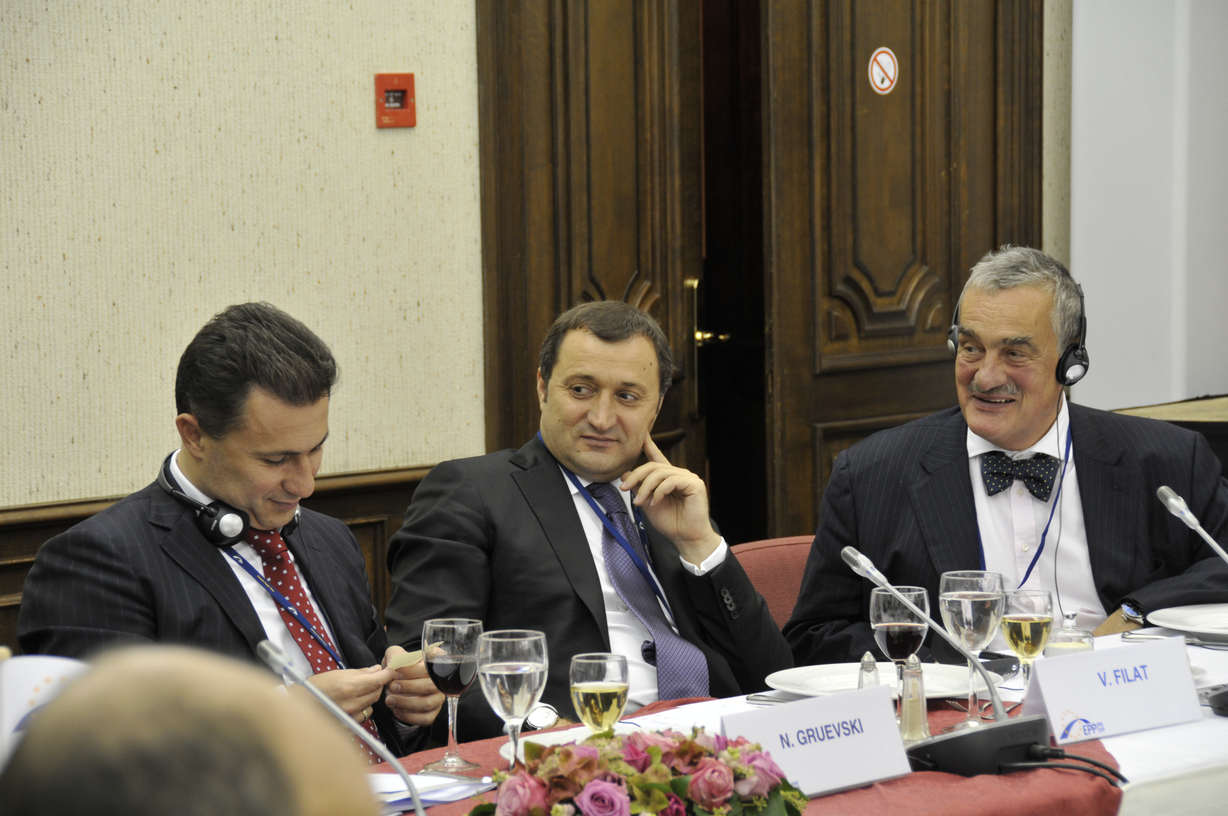 EPP Summit September 2010